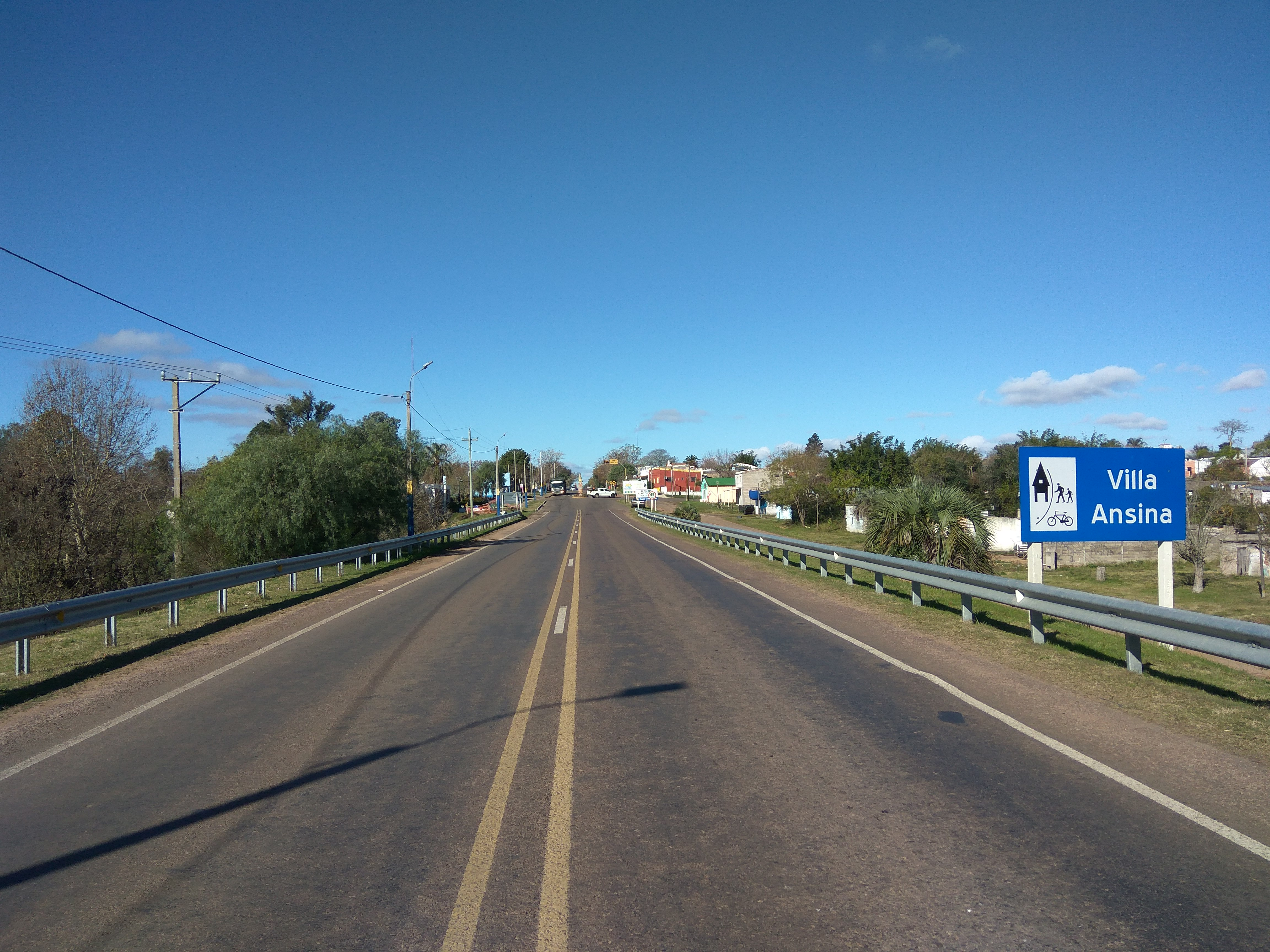 Entrada a la localidad de Villa Ansina por la ruta 26. Departamento de Tacuarembó, Uruguay.